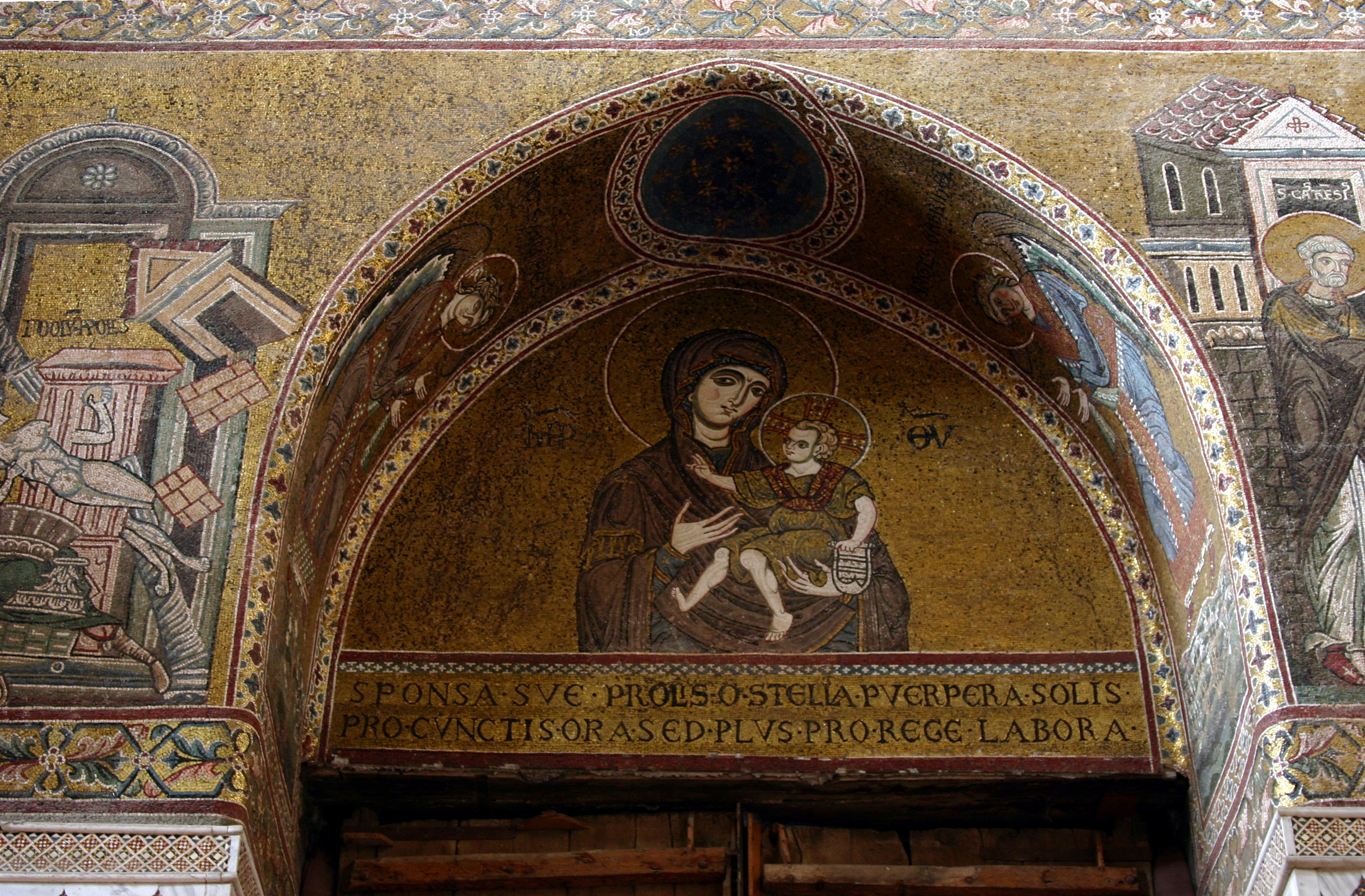 Cathedral of Monreale